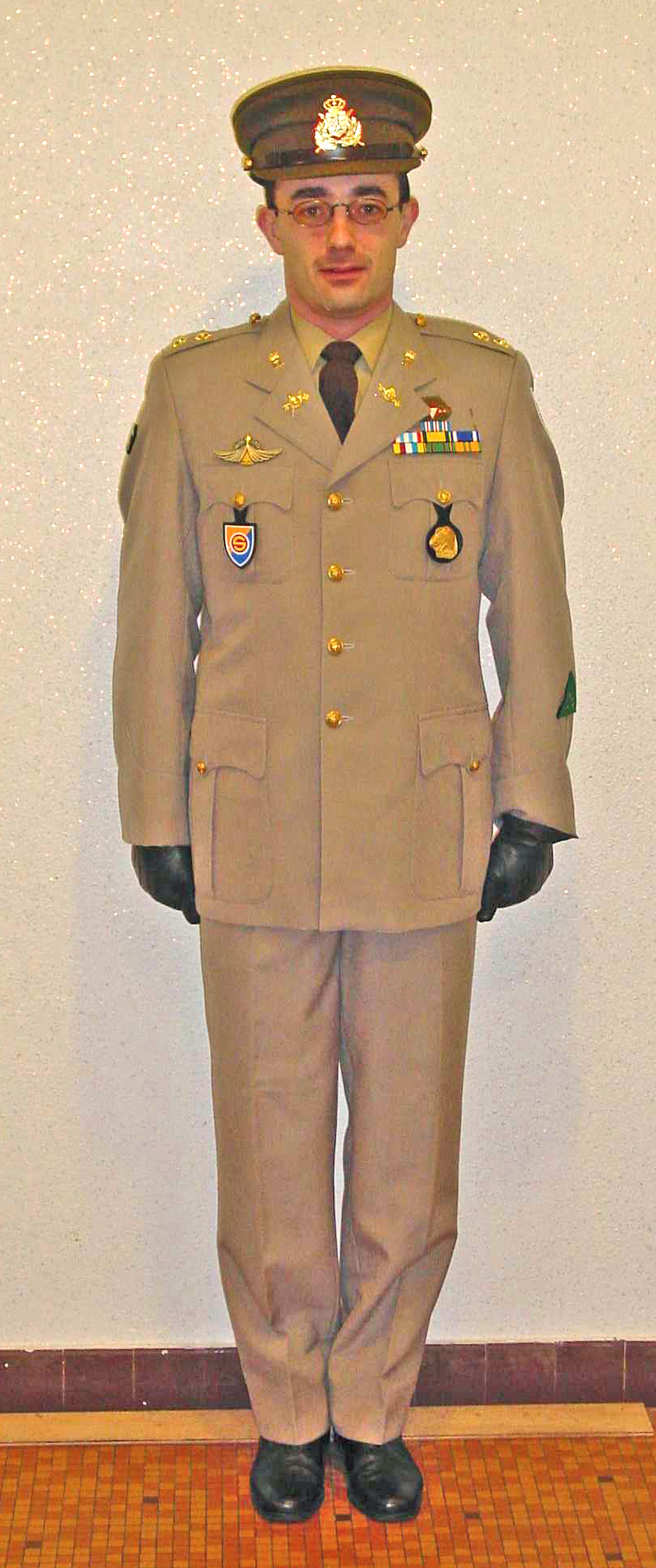 Lëtzebuerger Arméi Uniform Tenue S2E mat Képi